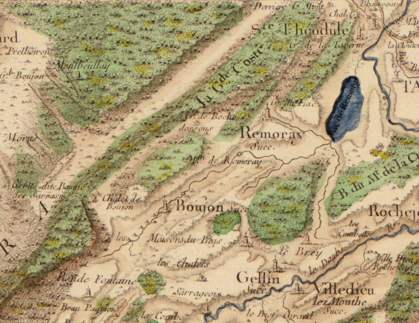 Carte de Cassini n°147 (Nozeroy, zoom sur Remoray-Boujeons), 1759.